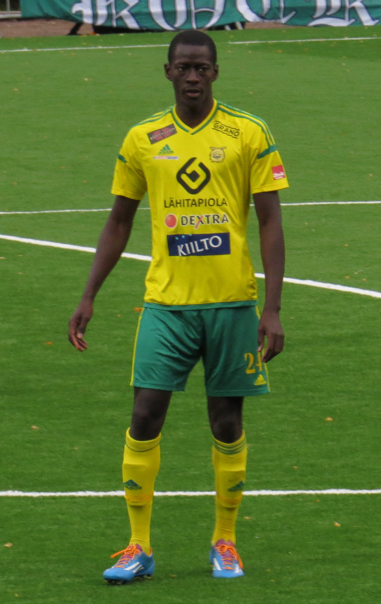 Mamadou Diouf, senegalilainen jalkapalloilija Tampereen Ilveksen joukkueessa kaudella 2015.